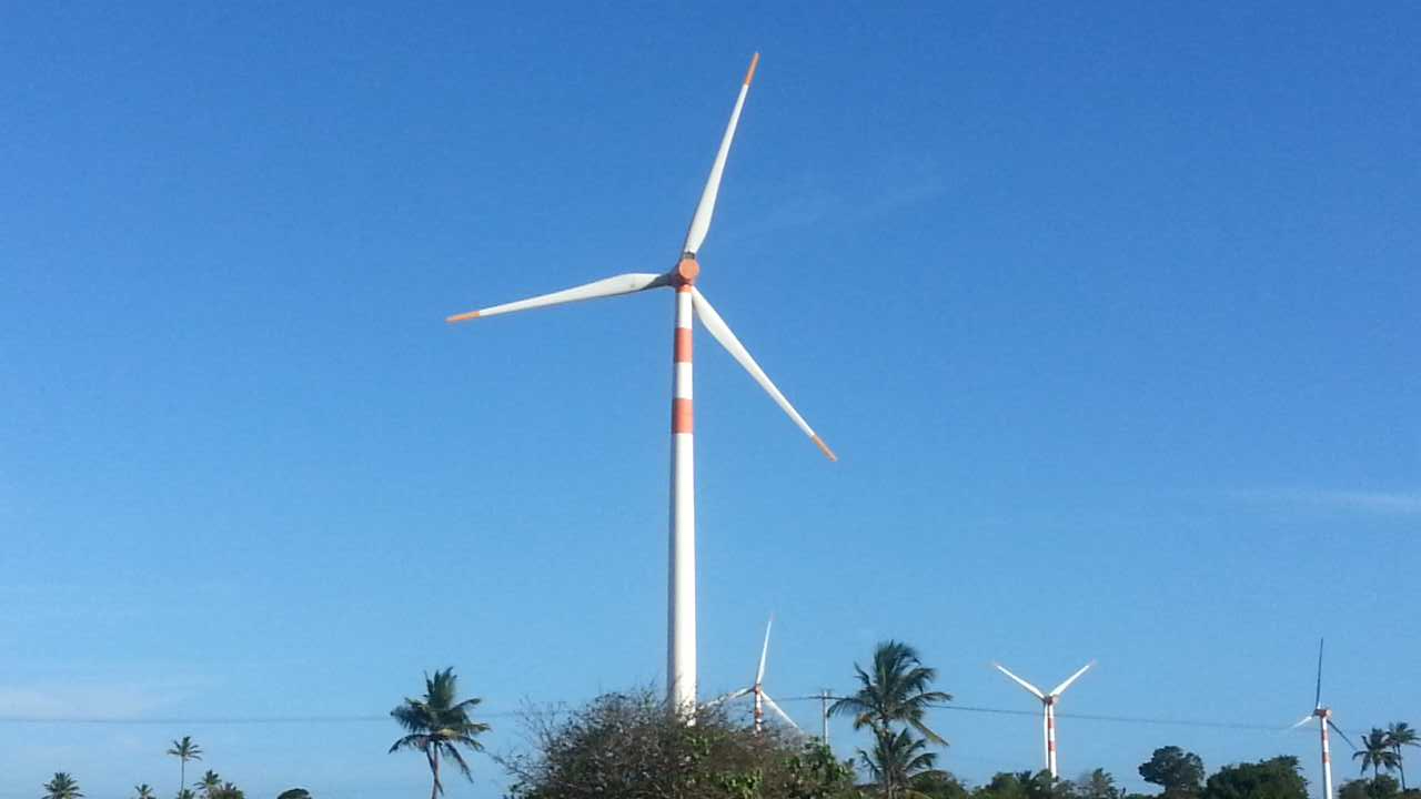 Primeiro parque eólico de Sergipe